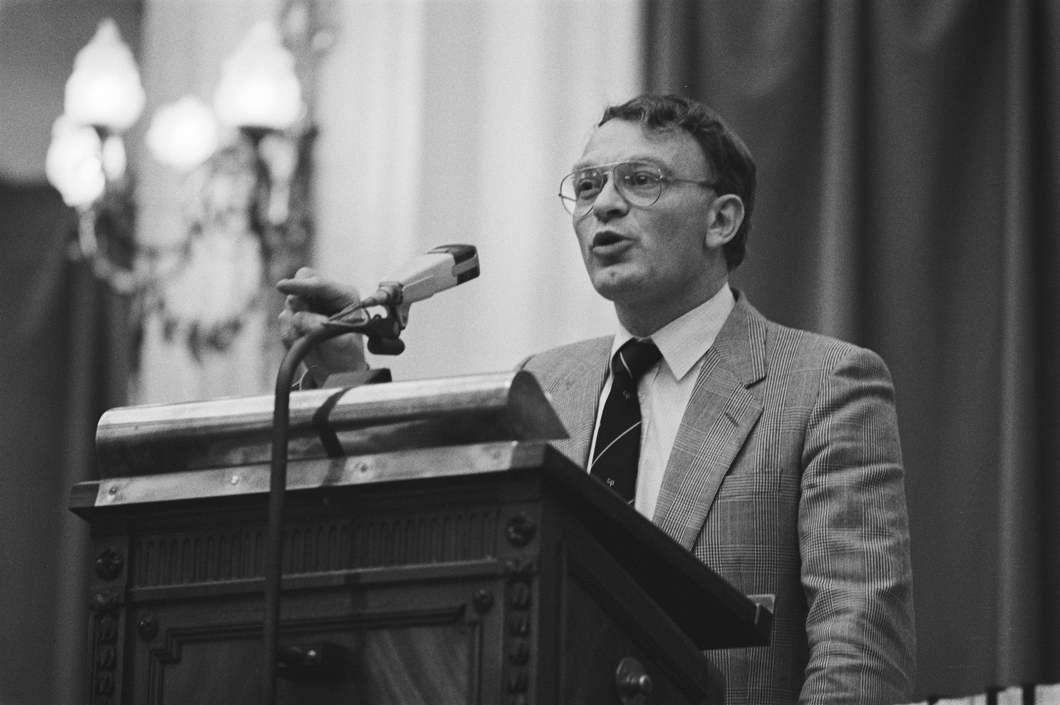 Collectie / Archief : Fotocollectie Anefo Reportage / Serie : Tweede Kamer debat Beschrijving : Tweede Kamer; Hans Janmaat aan het woord Datum : 17 mei 1984 Locatie : Den Haag, Zuid-Holland Trefwoorden : parlementariërs, politiek Persoonsnaam : Janmaat, Hans Instellingsnaam : Tweede Kamer Fotograaf : Bogaerts, Rob / Anefo Auteursrechthebbende : Nationaal Archief Materiaalsoort : Negatief (zwart/wit) Nummer archiefinventaris : bekijk toegang 2.24.01.05 Bestanddeelnummer : 932-9715